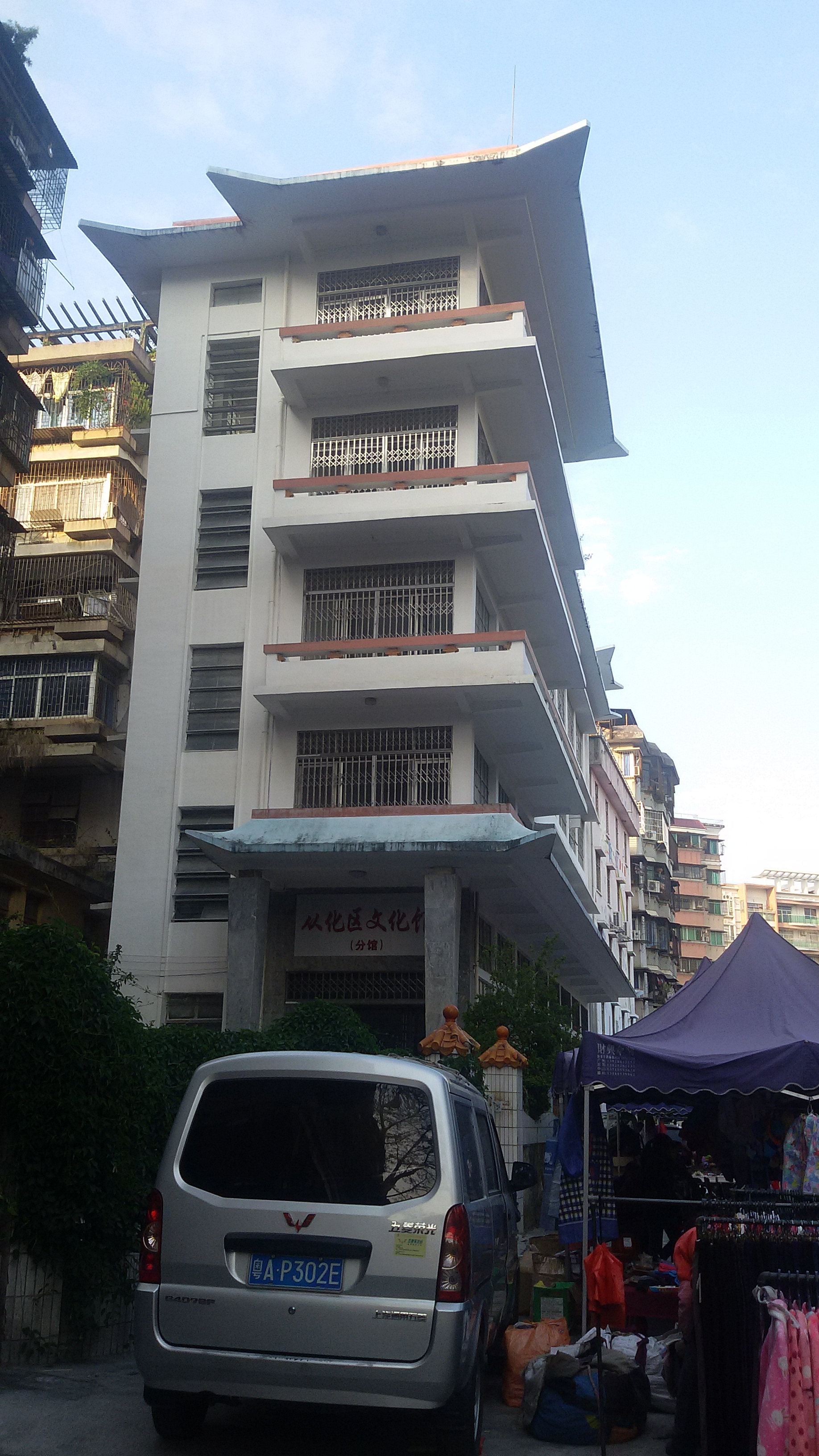 粵語: 从化区文化馆